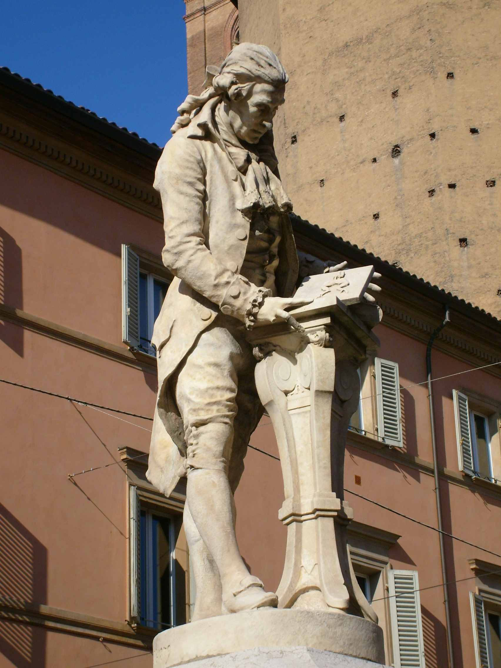 Luigi Galvani’s monument, piazza Galvani, Bologna, Italy